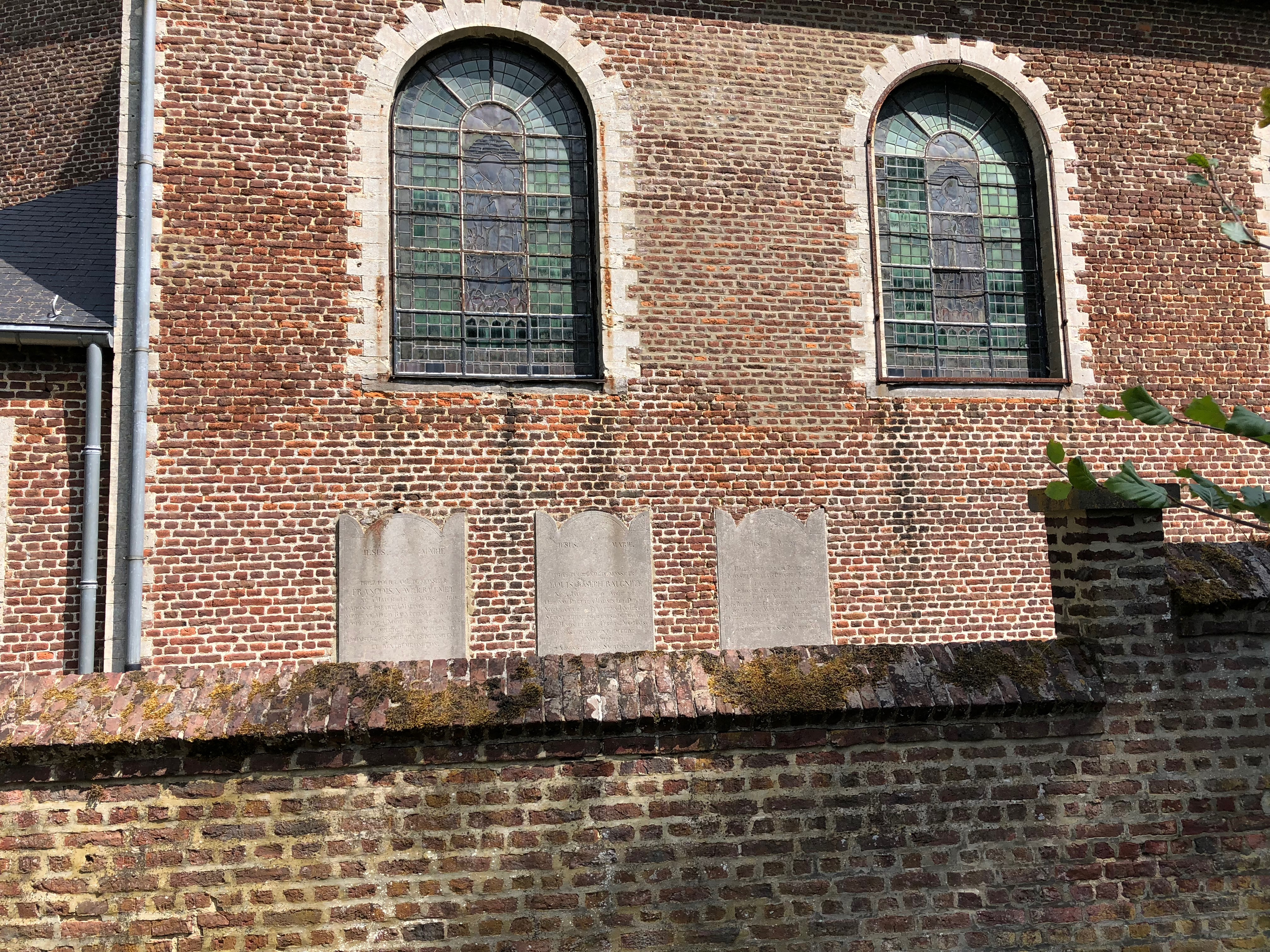 Église Sainte-Waudru (Détails)